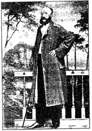 Полковник Михаил Романович Насакин